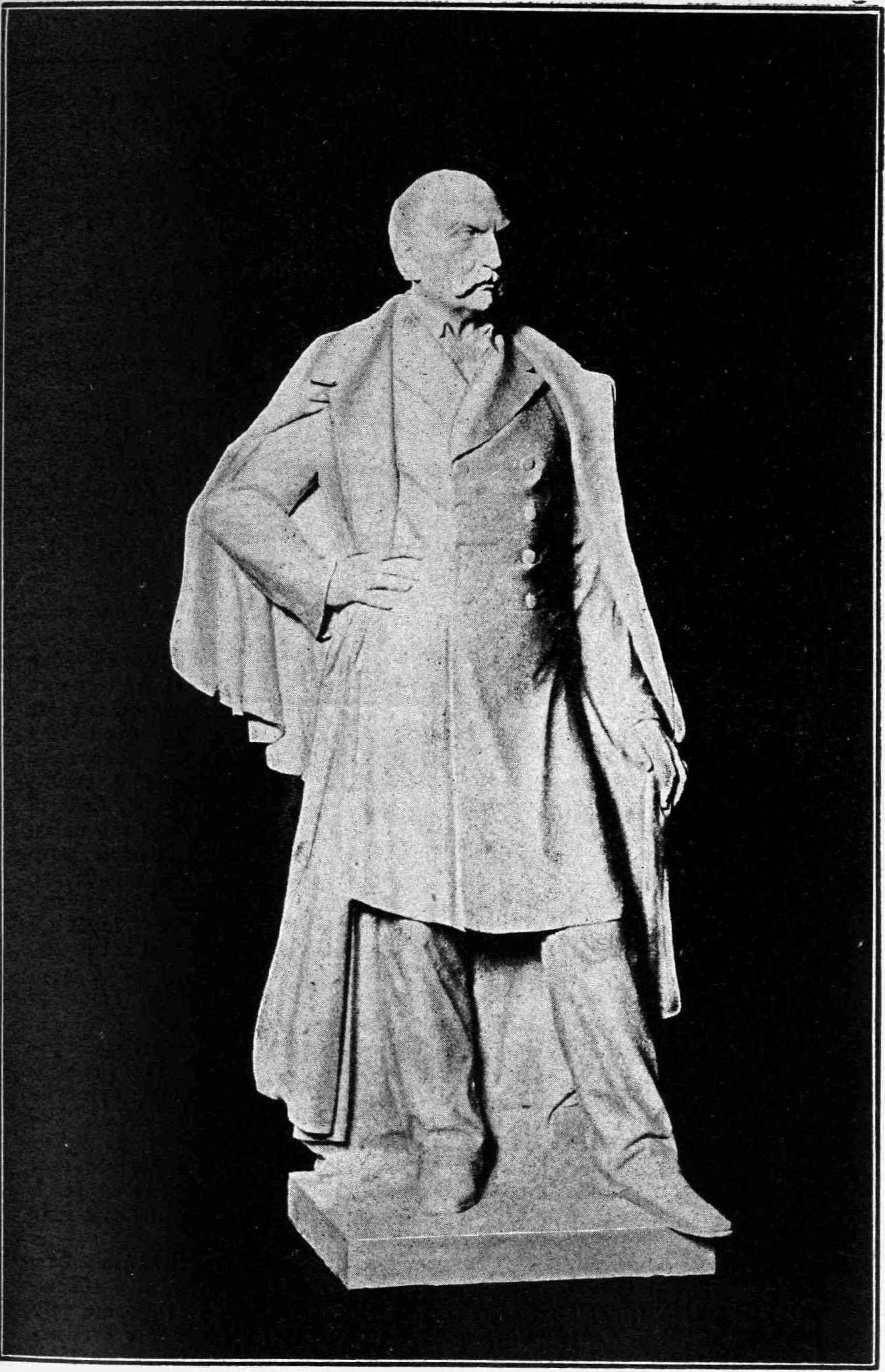 Statue des Griechen Ballianos